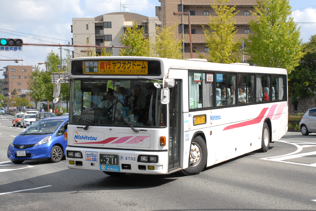 京町支社